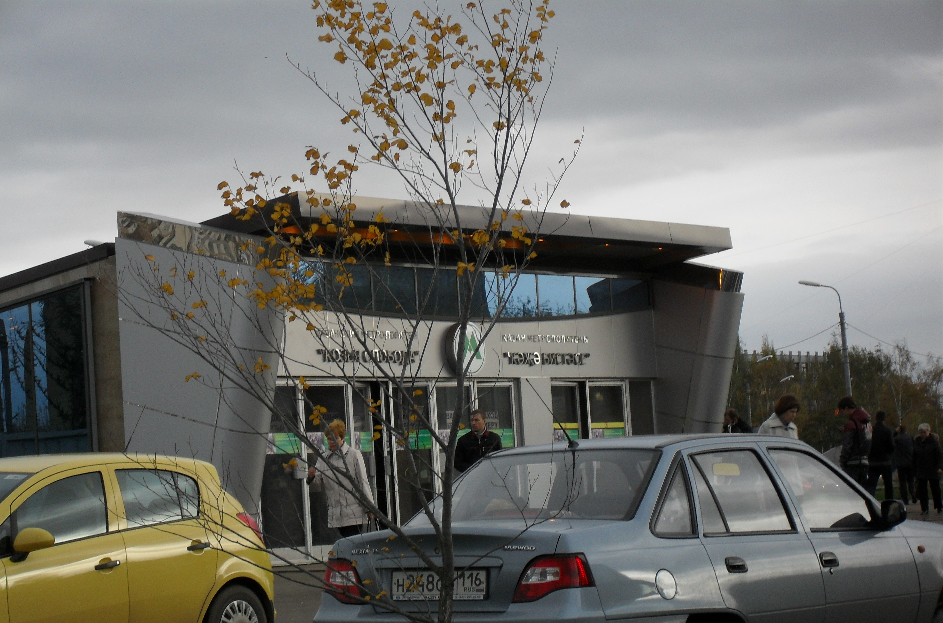 Вход на станцию Козья Слобода с улицы Вахитова (Казань)